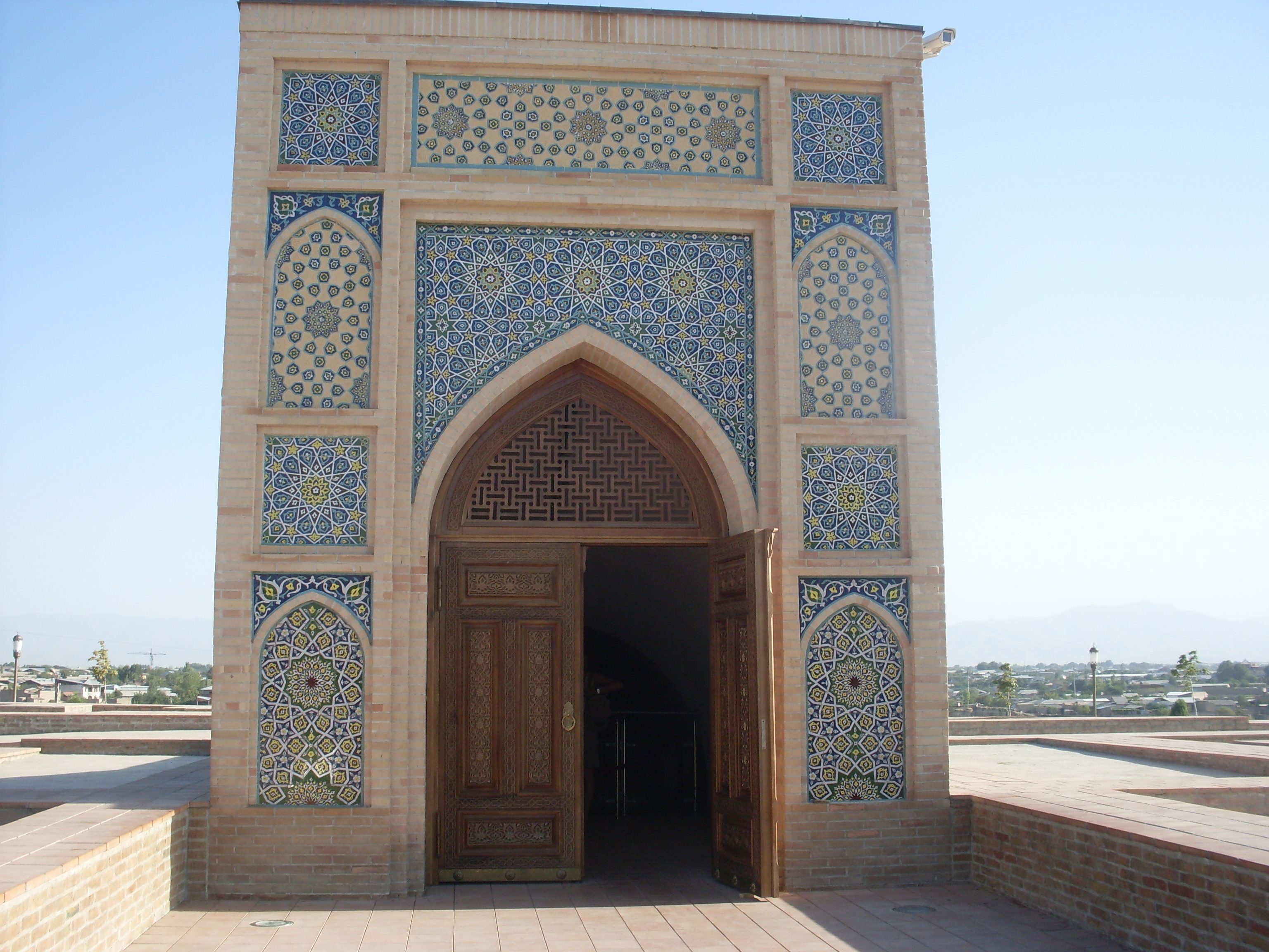 Observatie Ulugbek Обсерватория Улугбека секстант вход